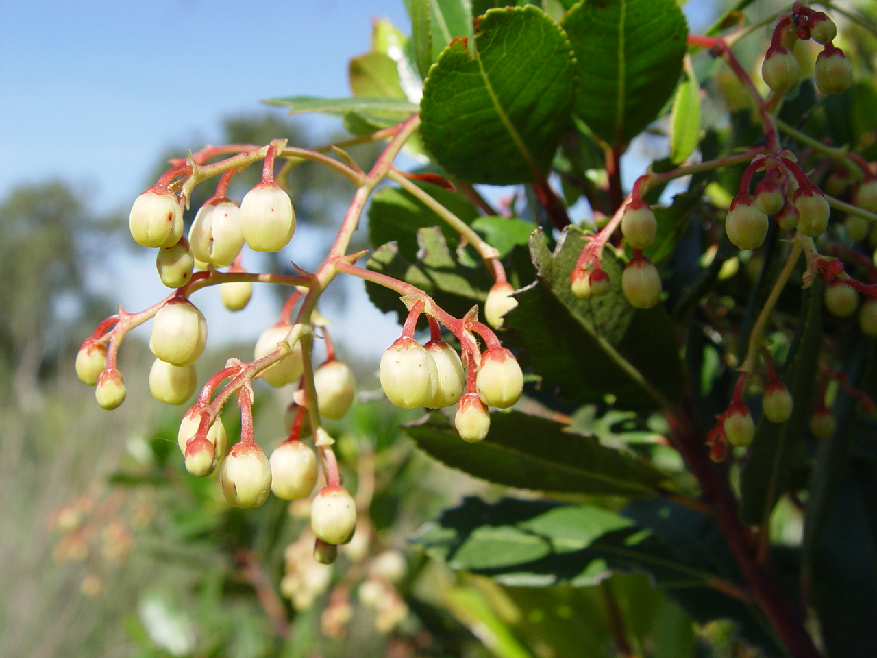 Name Arbutus unedo Familiy Ericaceae